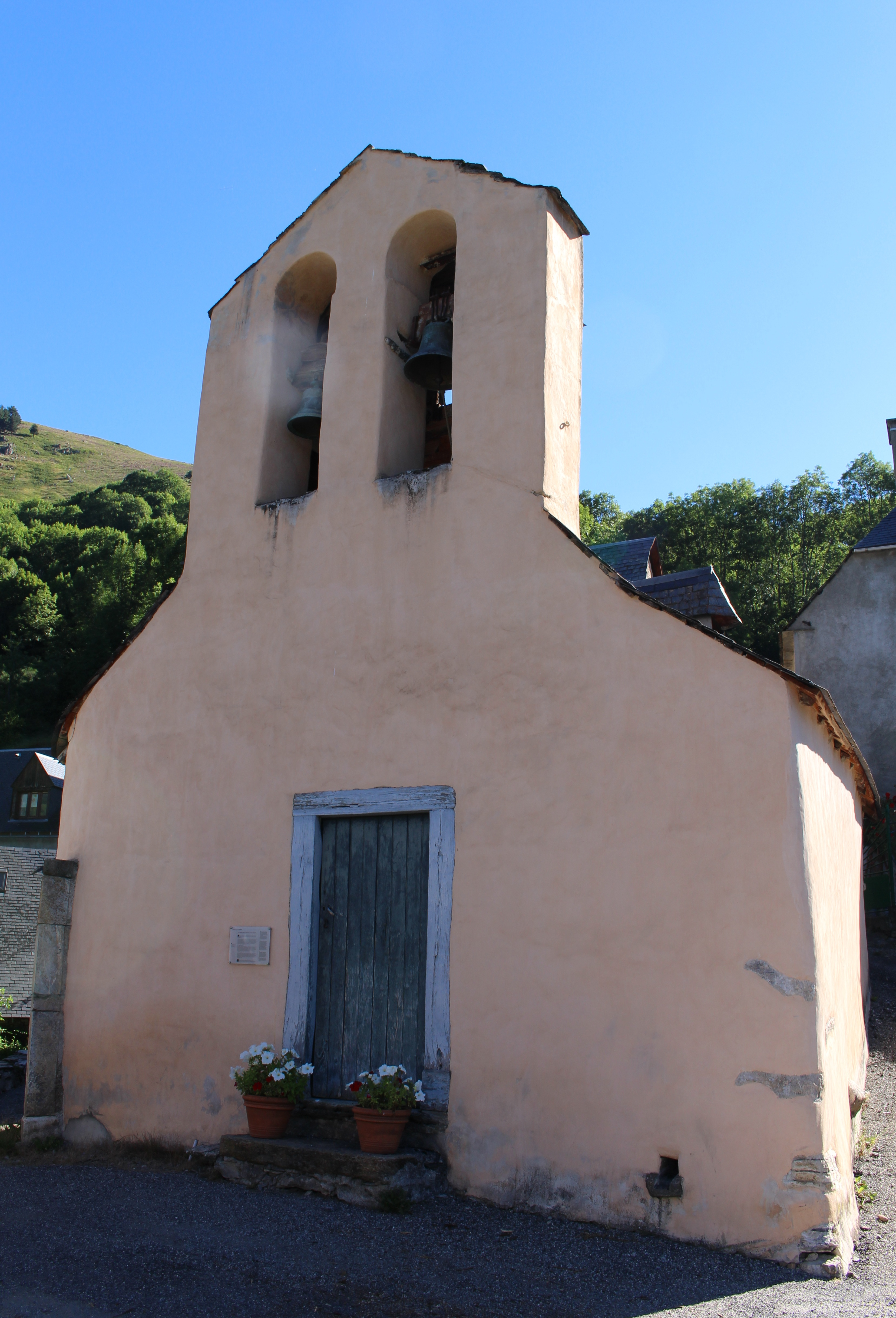 Chapelle Notre-Dame de Fréchet (Hautes-Pyrénées)